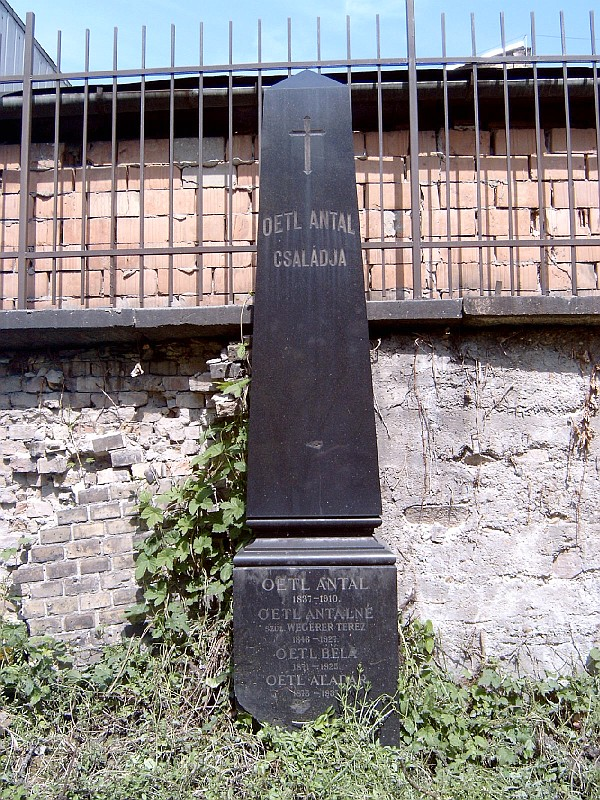 Oetl Antal (Buda, 1837 – Bp., 1910. nov. 13.): vasöntő, vasöntöde- és gépgyáralapító sírja Budapesten. Kerepesi temető: B-378.